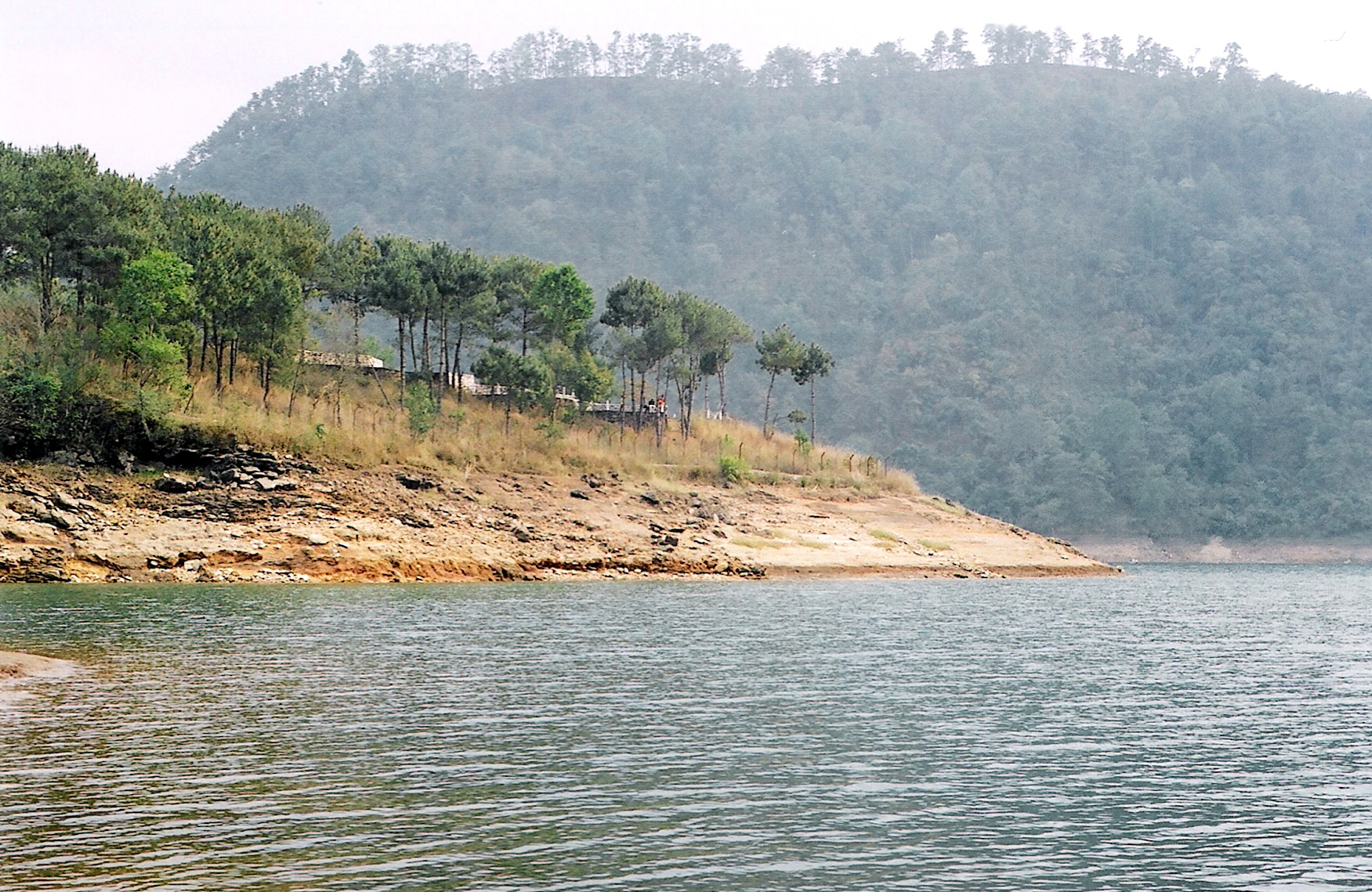 "Umiam Lake, Meghalaya"